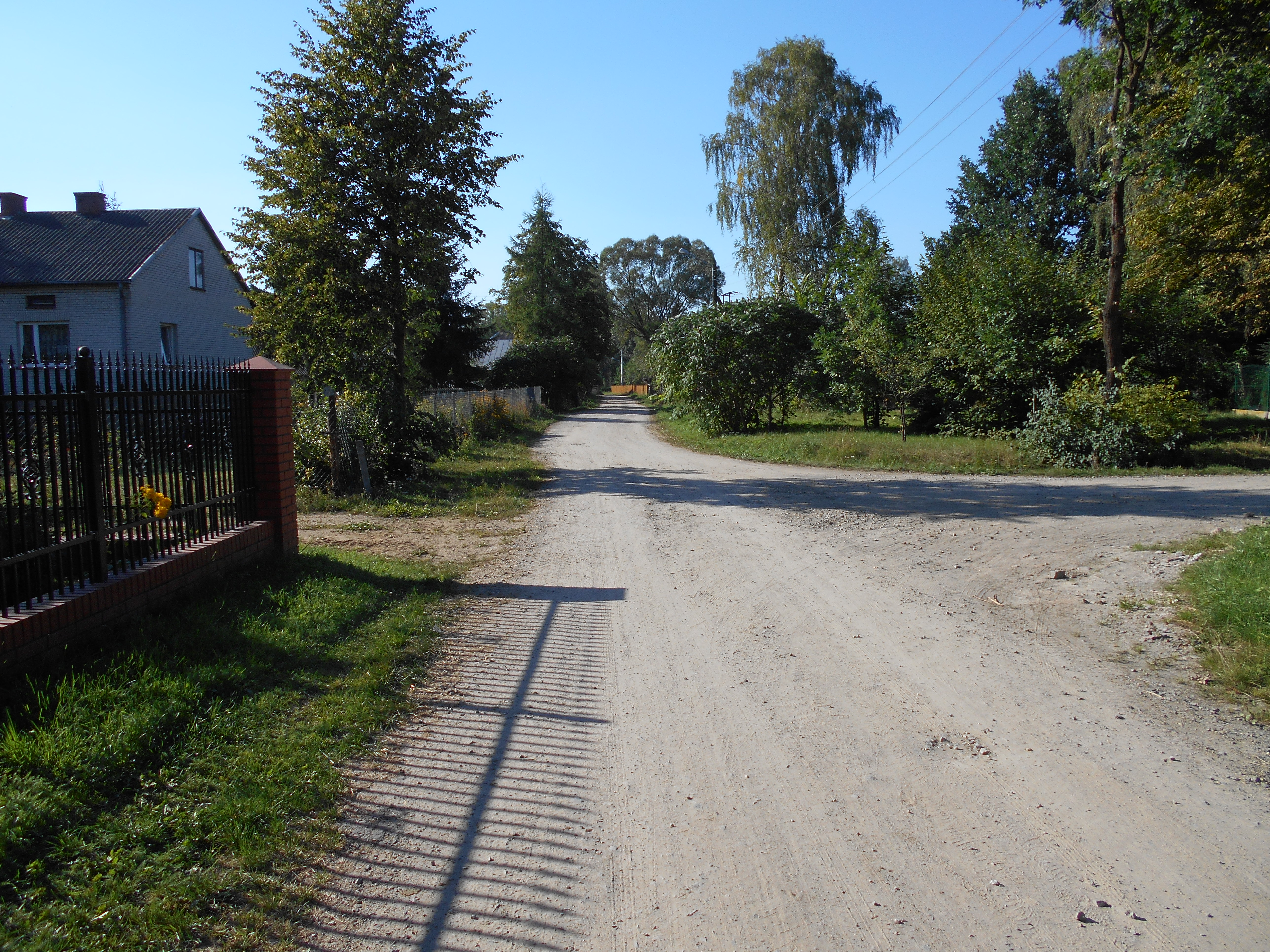 Miejscowość w gminie Siennica